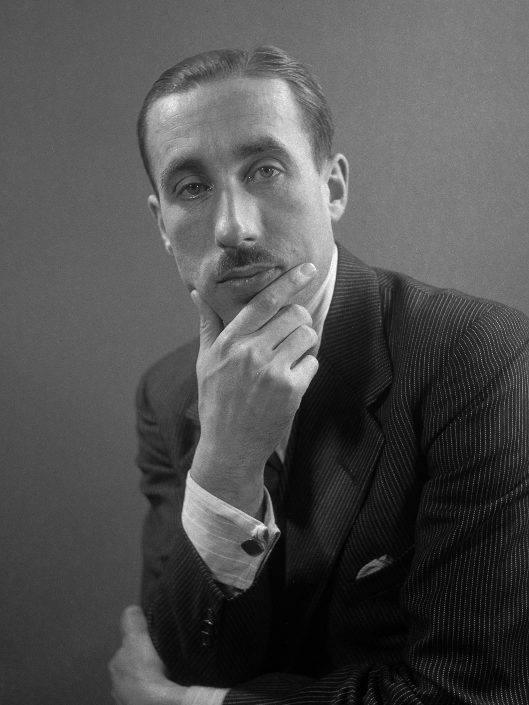 Leonard Huizinga 5 november 1945